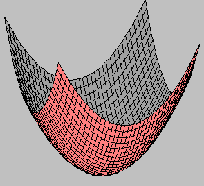 Paraboloide Immagine Generata tramite il programma freeware WinPlot